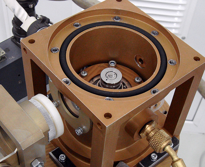 Экспериментальная установка для лазерной балансировки гироскопов ДНГ и РВГ